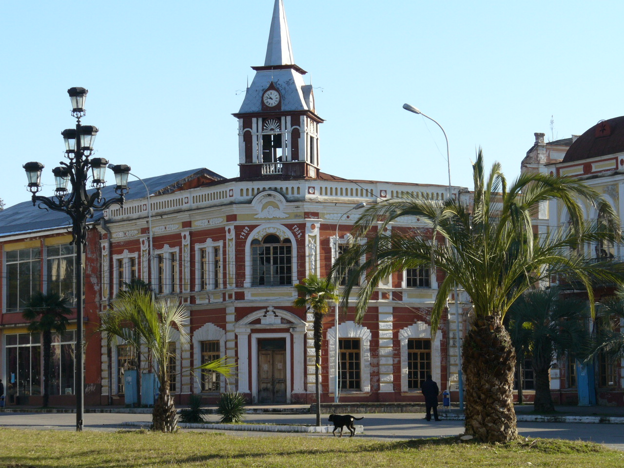 Gunda department store in Gudauta, Abkhazia